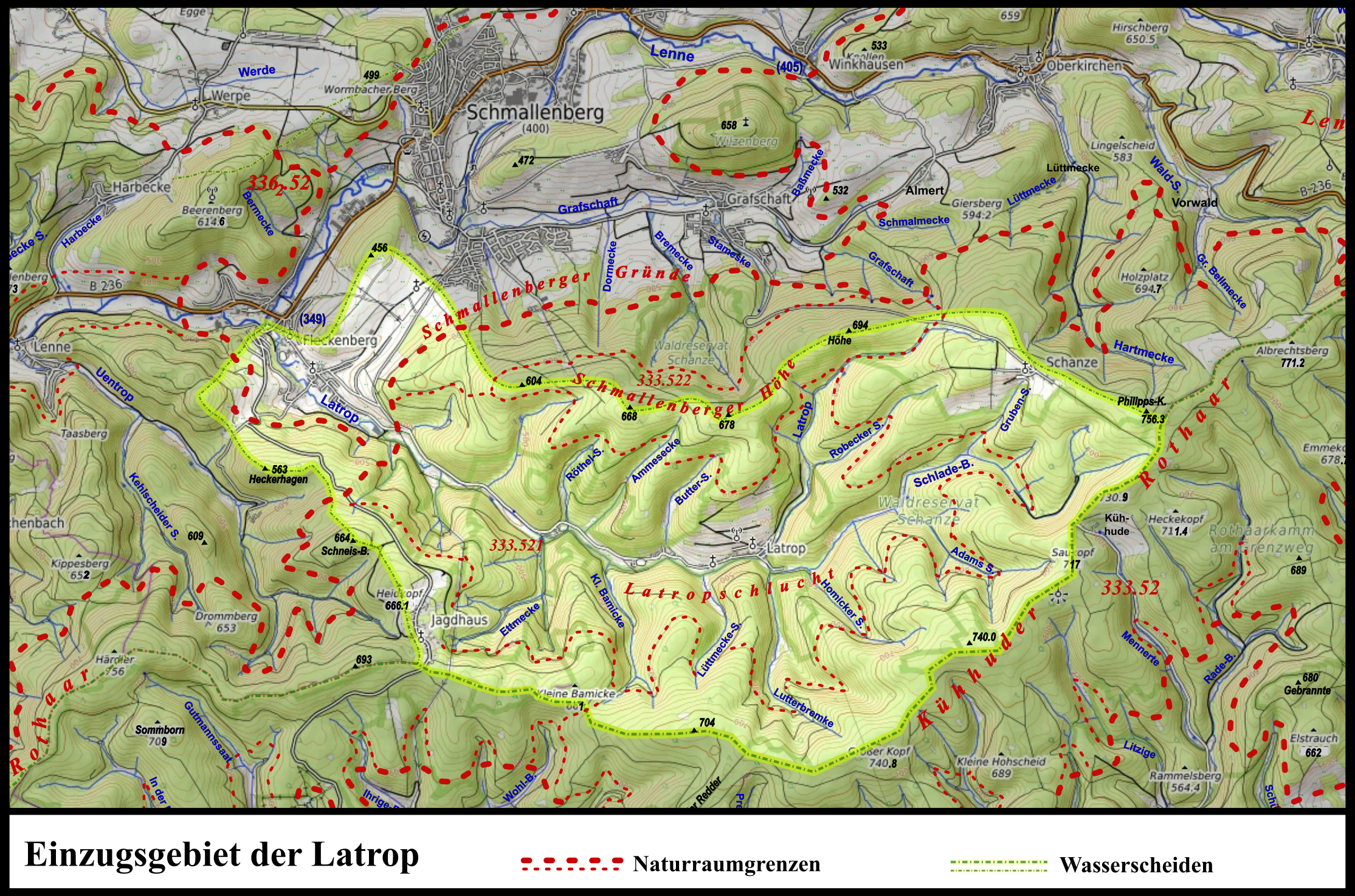 Karte des Einzugsgebiets der Latrop mit der Latropschlucht, die von drei Teilen der Rothaar (Schmallenberger Höhe, Kühhuder Rothaar und Rüsper Rothaar) eingerahmt wird und selber den vierten bildet; mit Latrop im Zentrum, Fleckenberg im nördlichen Westen, Schmallenberg im Nordwesten und Grafschaft im Norden